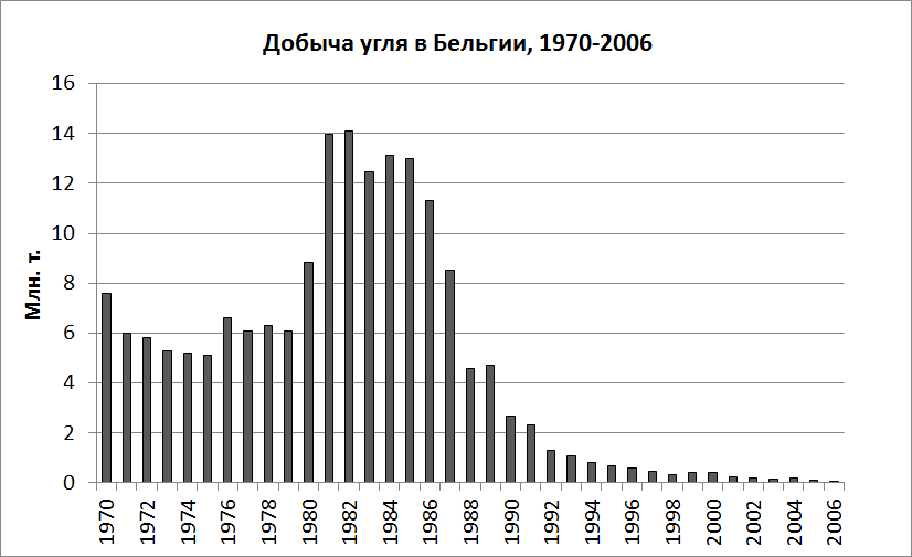 Построено по данным EIA и Miss van der Haagen